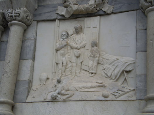 representacion en marmol de los caidos de la fiebre amarilla. Buenos Aires.Parque Ameghino.